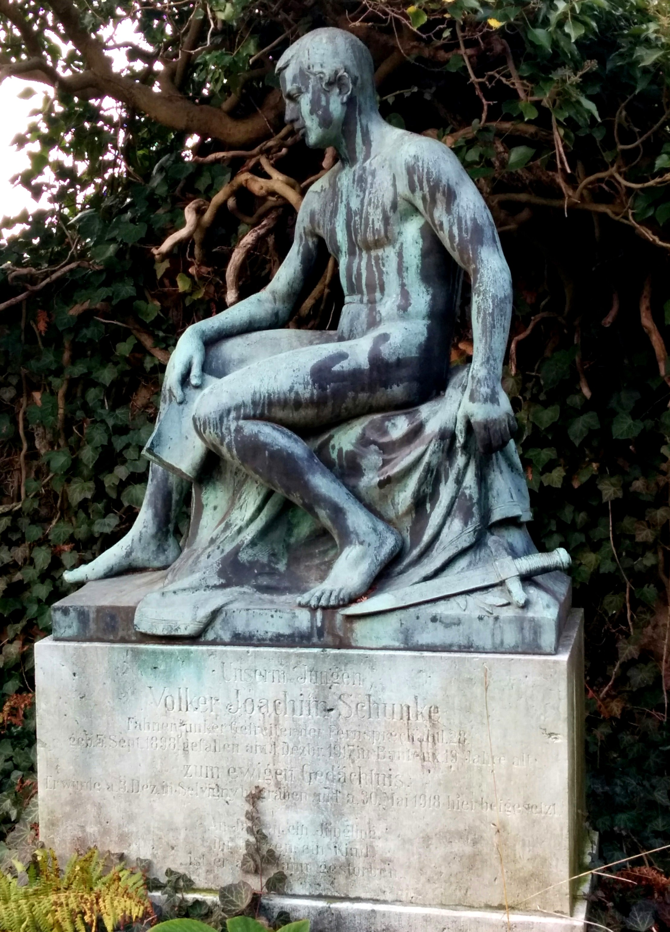 Grabmal von Volker Schunke (1898 - 1917), dem einzigen Sohn von Ernst Schunke, dem Förderer des Malers Otto Dix, auf dem Bergfriedhof in Schleiz